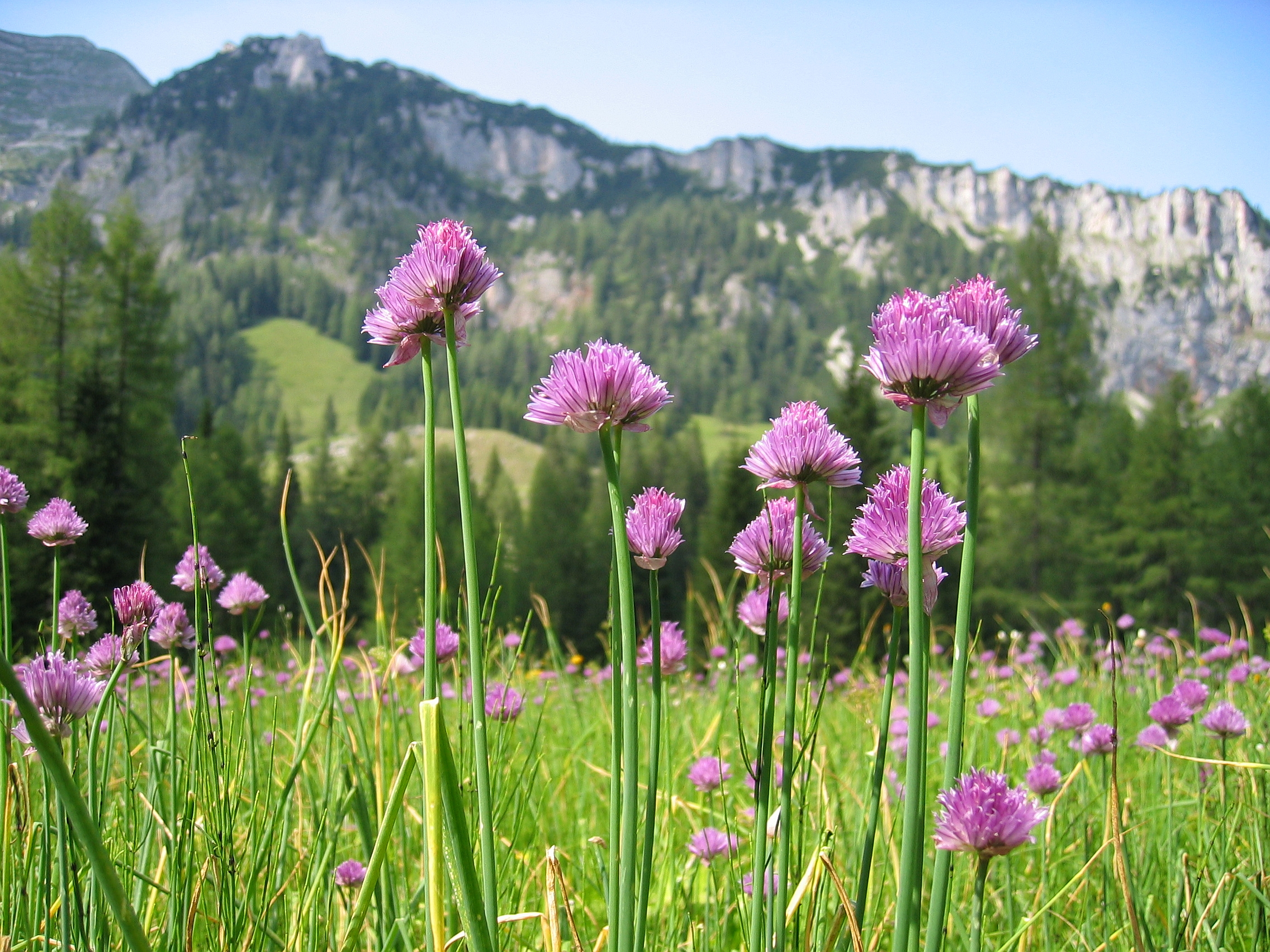 Allium schoenoprasumvar. alpinum, Wurzeralm, ~1.400 m, Upper Austria, Austria